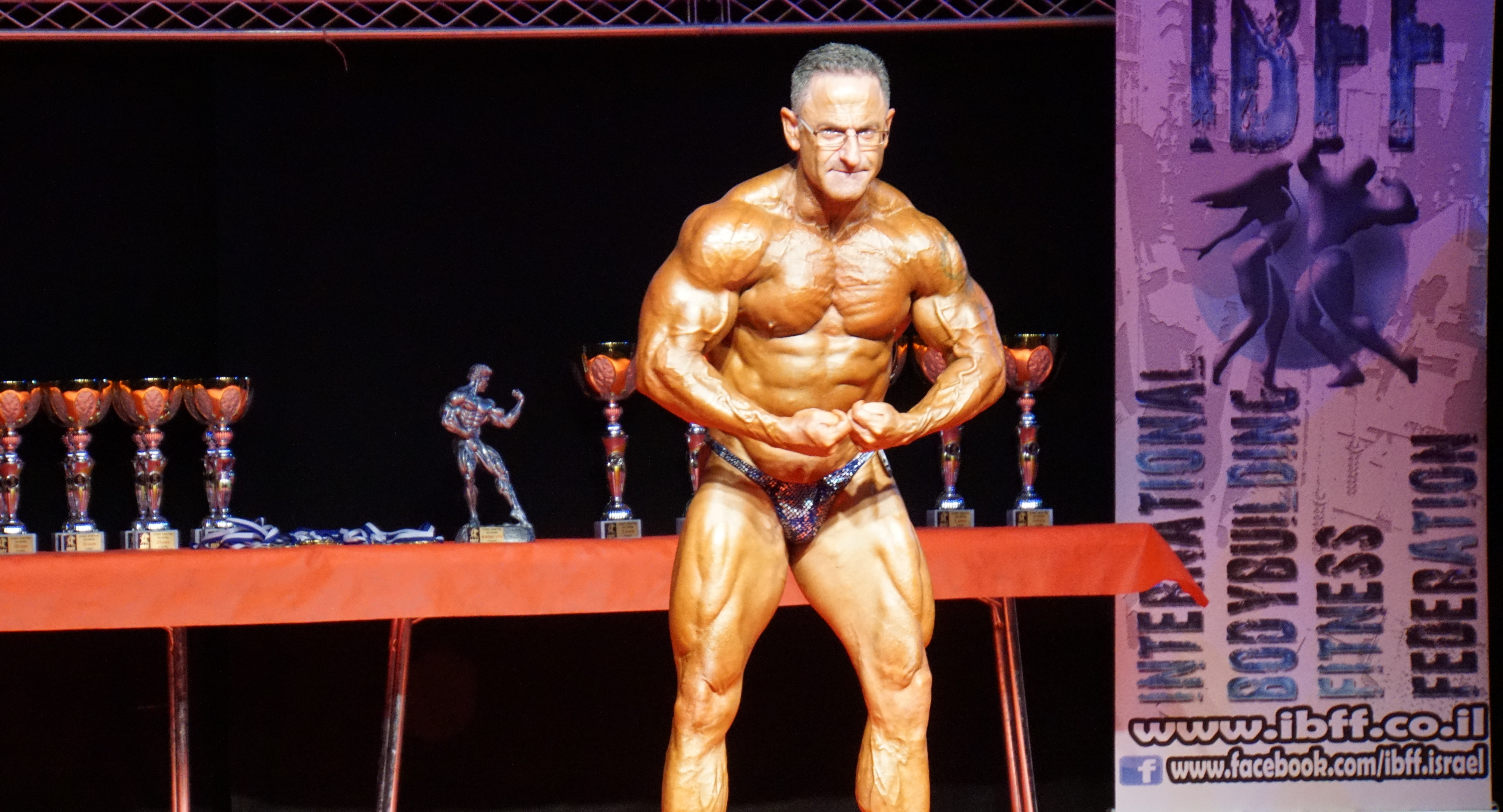 תמונה מתחרות מר ישראל 2018 של איגוד IBFF - צילום : אדם חיון